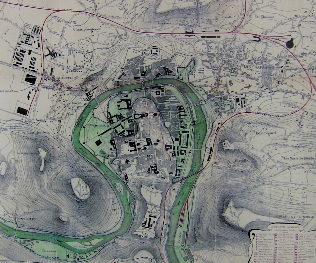 Plan de Besançon (Doubs, France) lors de la crue du Doubs de 1910.